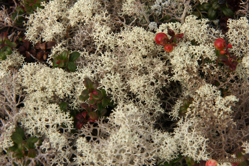 Le lichen est abondant dans la région du complexe La Grande, dans le Nord-du-Québec.